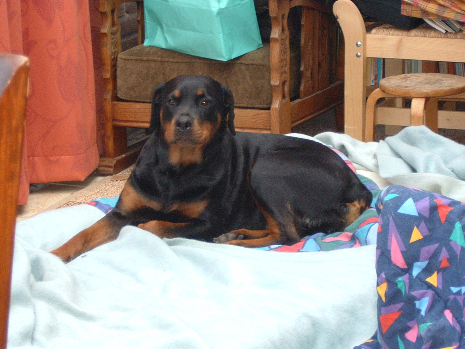 Rottweiler